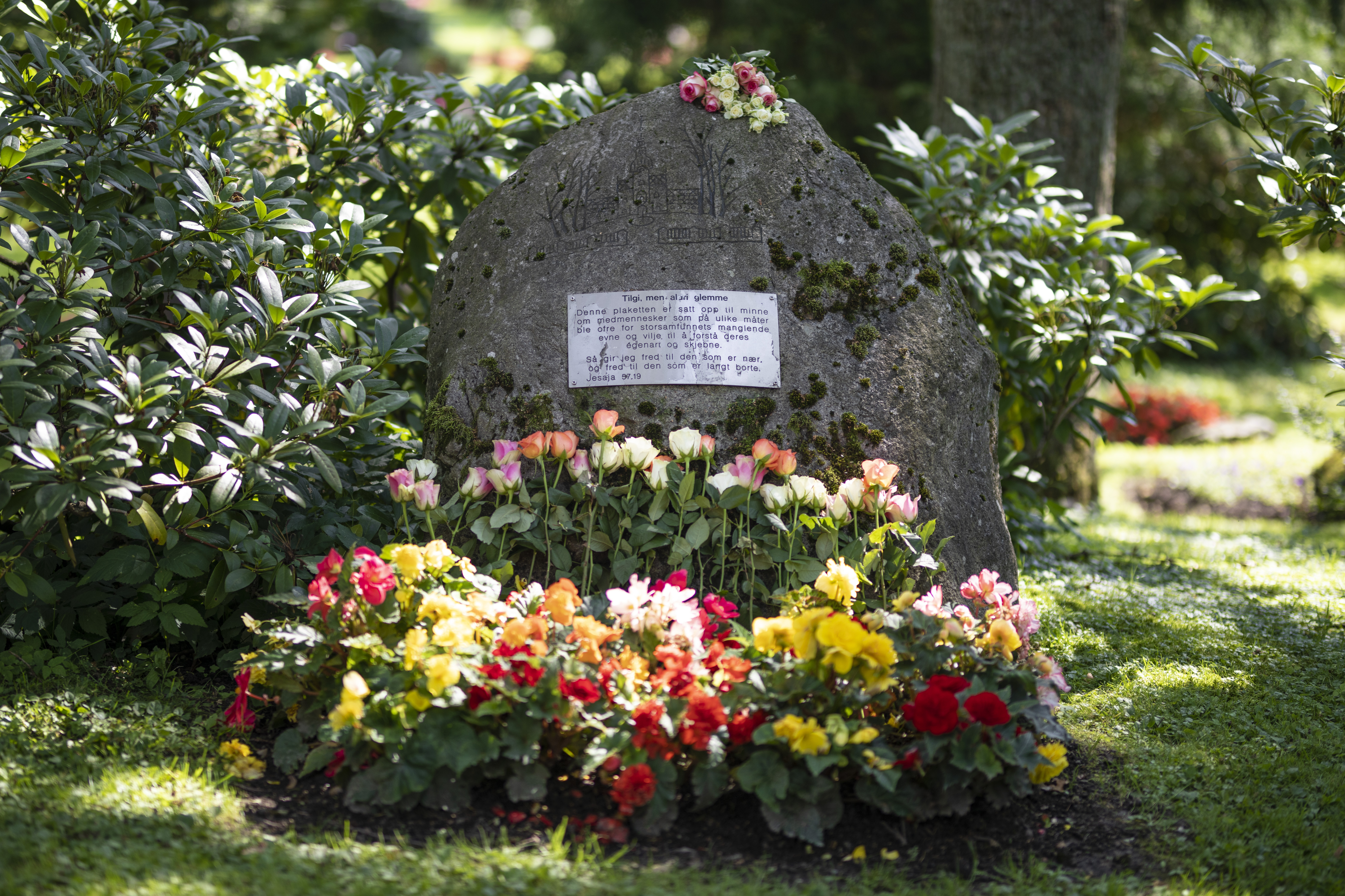 Skammens stein på Ris kirkegård